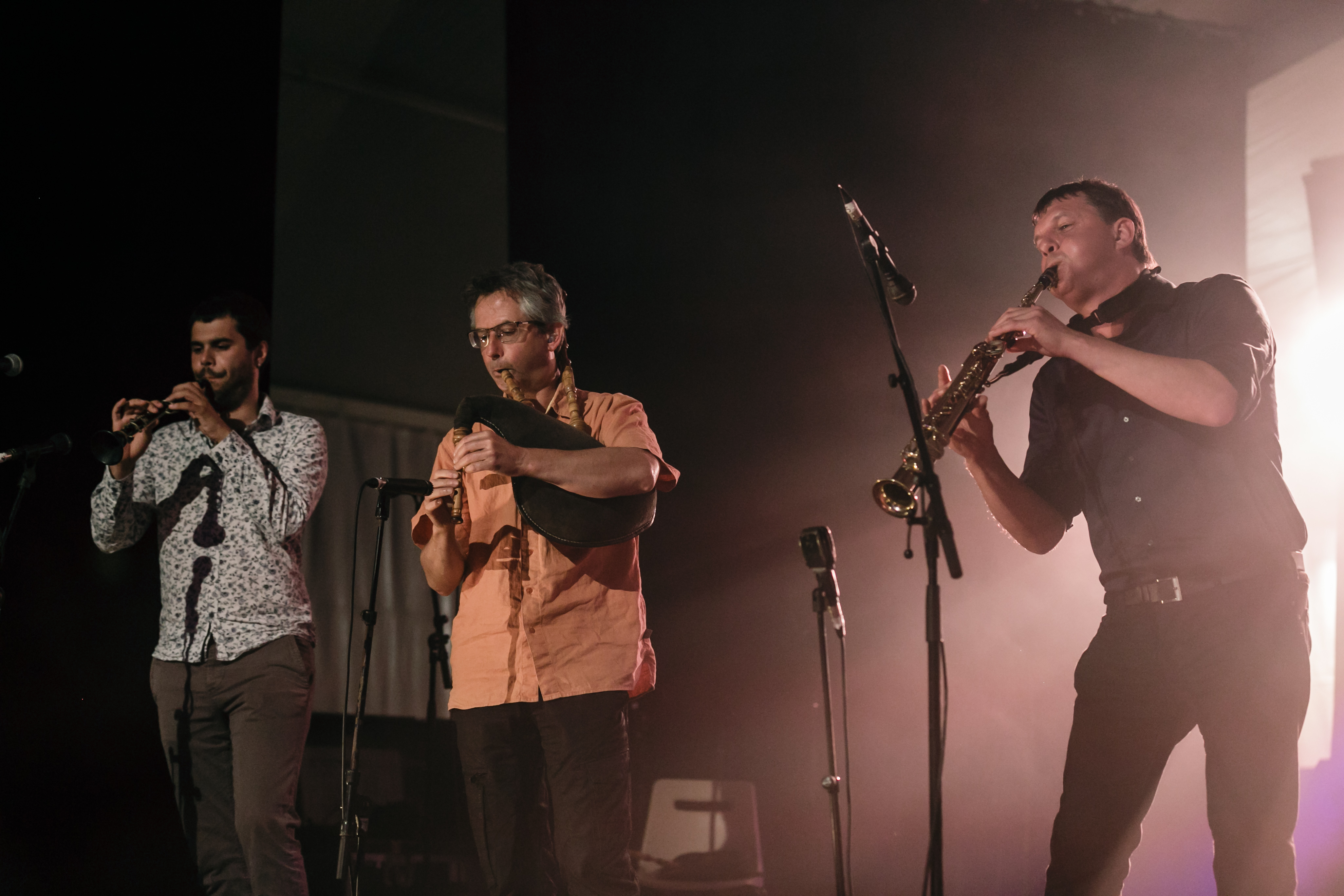 Ossian en fest-noz au festival de Cornouaille à Quimper le 20 juillet 2017.